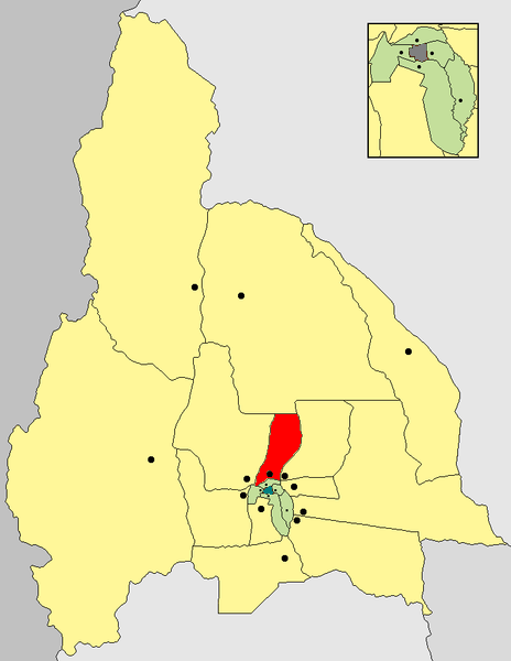 Mapa de la Provincia de San Juan donde se resalta el Departamento Albardón